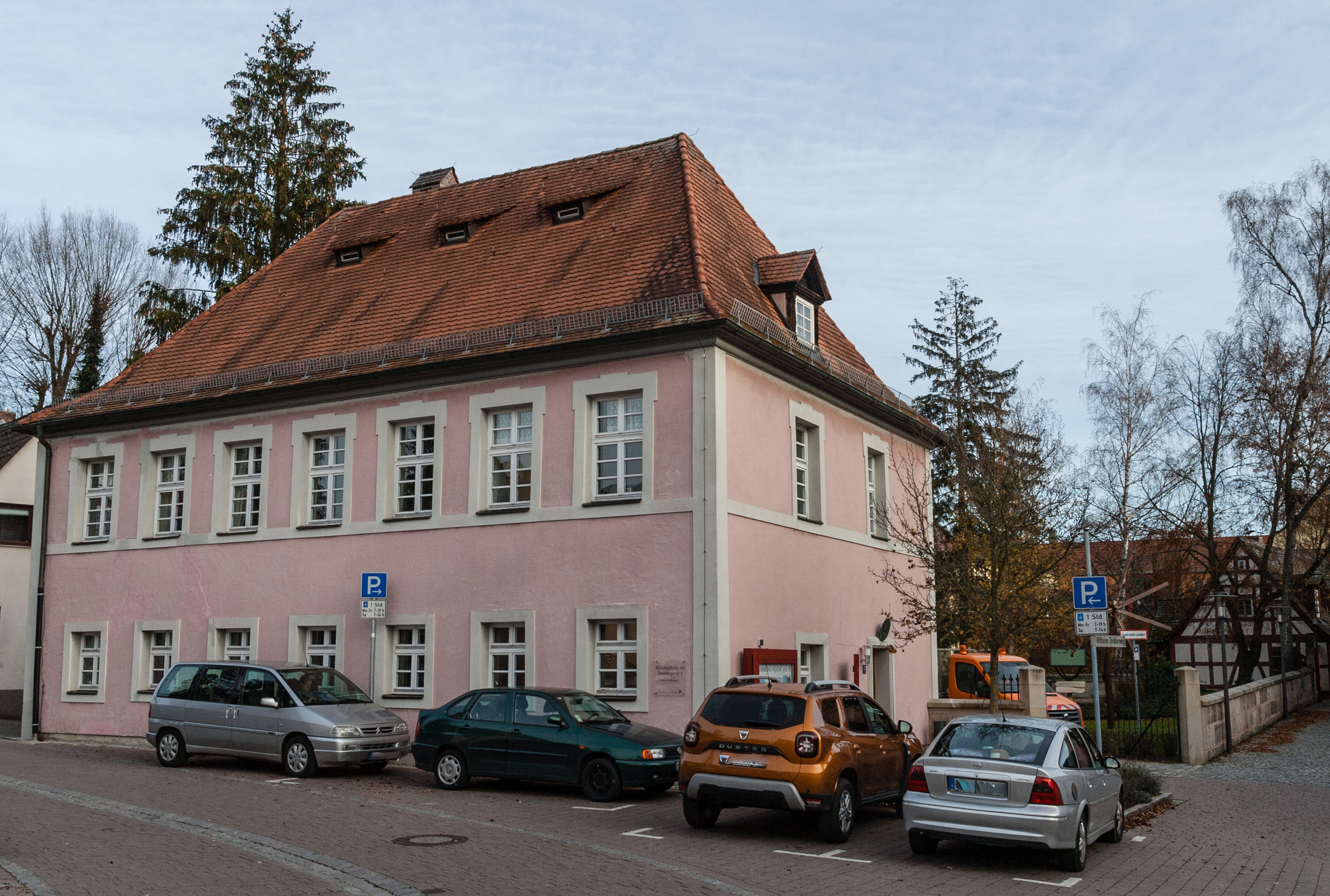 Zeidelgericht, Feucht, Baudenkmal